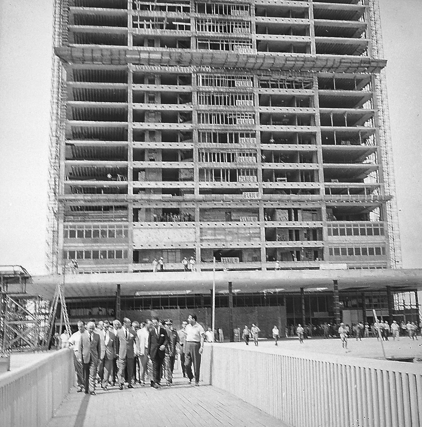 Imagem do Fundo Agência Nacional, do Arquivo Nacional